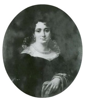 Графиня София Гауке, ур. Лафонтен (1790—1831)